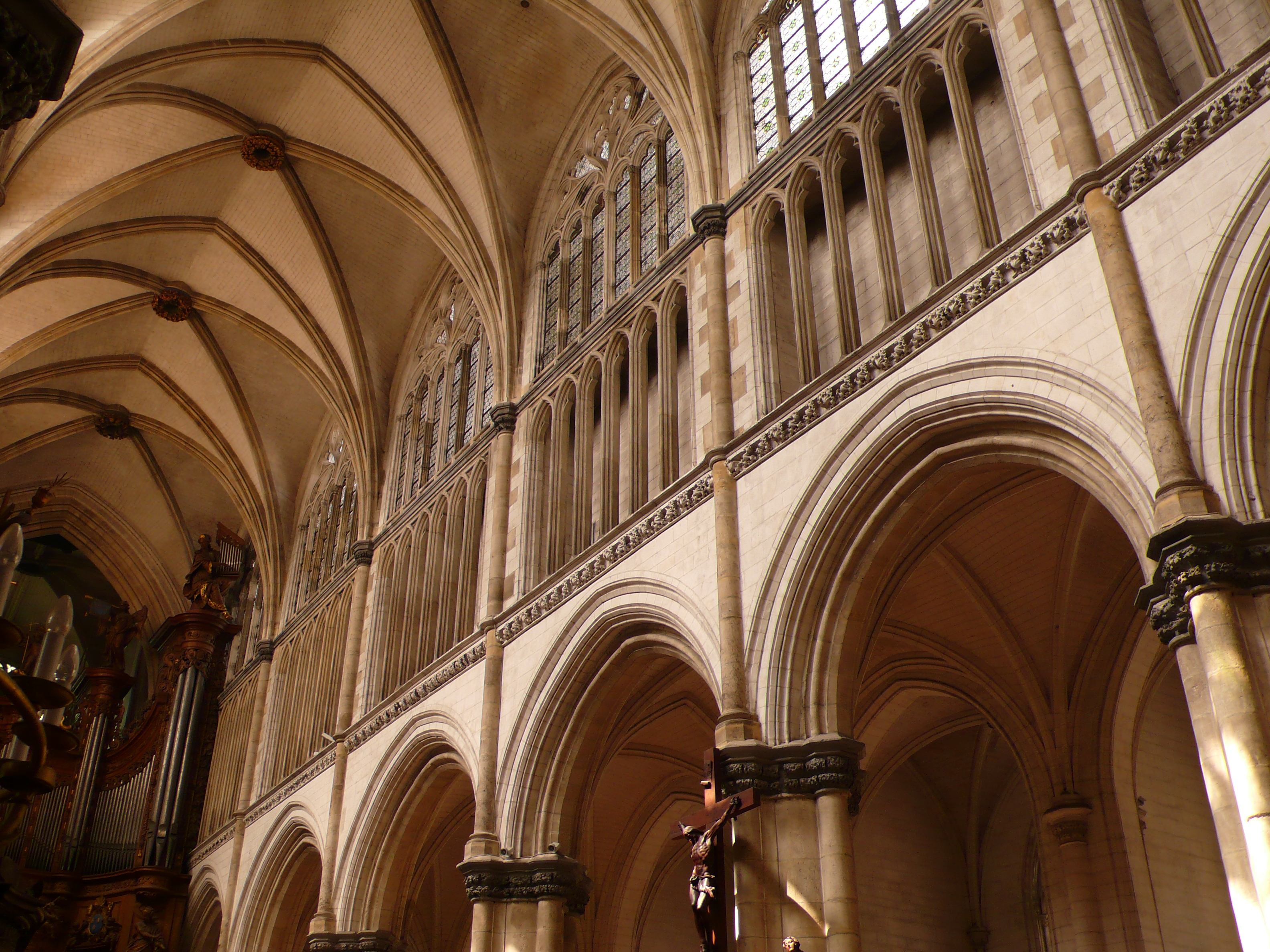 Cathédrale Notre-Dame de Saint-Omer, Frankreich; Mittelschiff, Wandaufriss